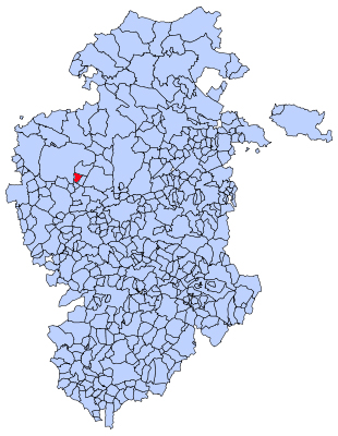 Extension de Tobar en la provincia de Burgos